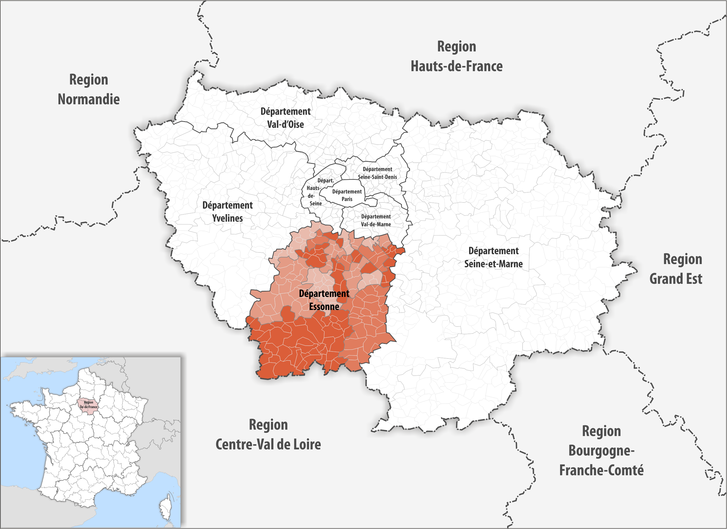 Lage des Departements Essonne